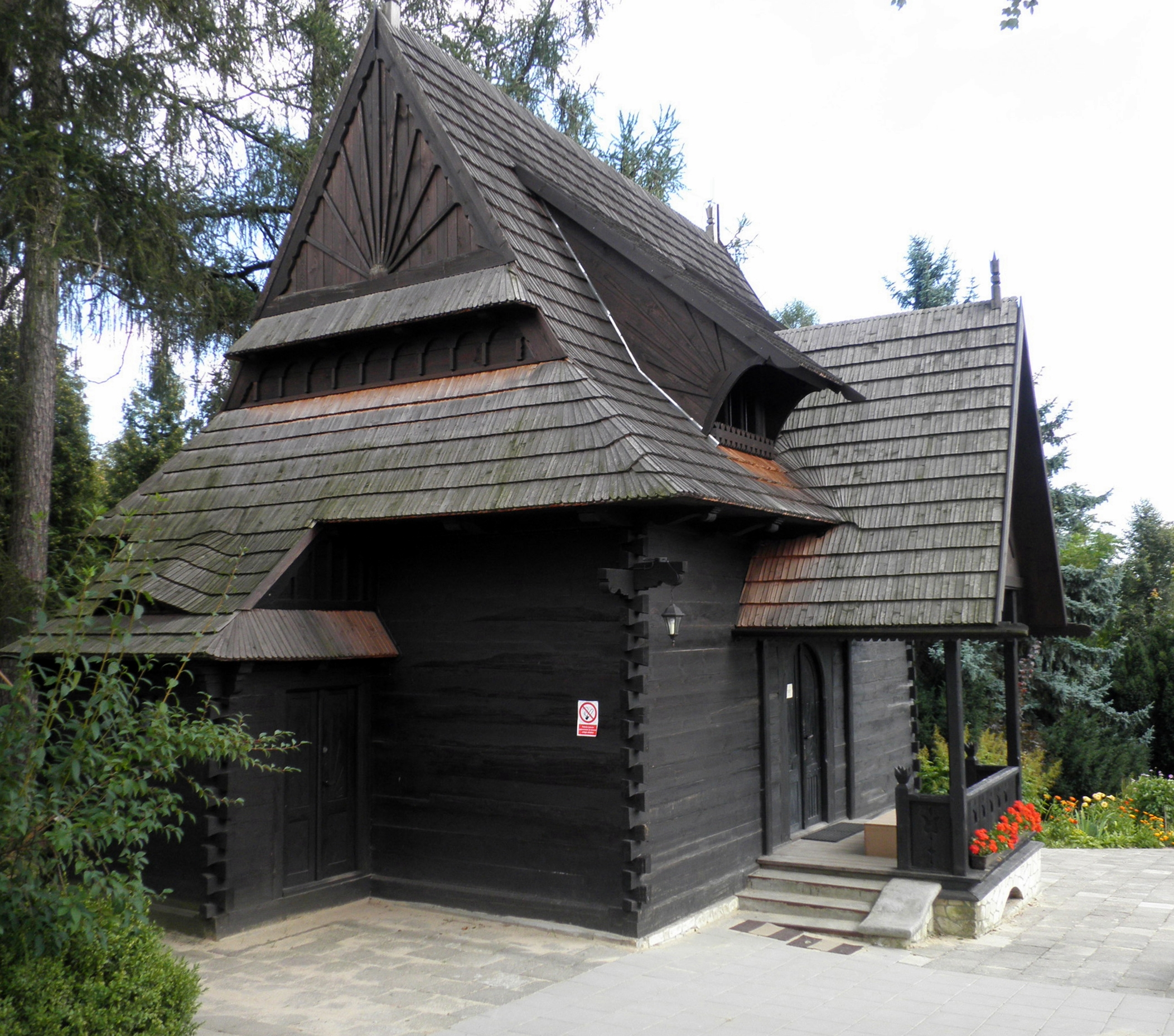 Chata Żeromskiego - Nałęczów, ul. Żeromskiego 1